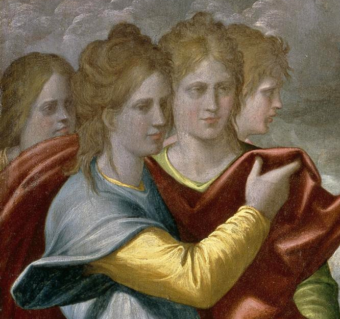 Detalle del Bautismo de Cristo, óleo sobre tabla. 48,5 x 37 cm (Museo del Prado, Madrid, España)